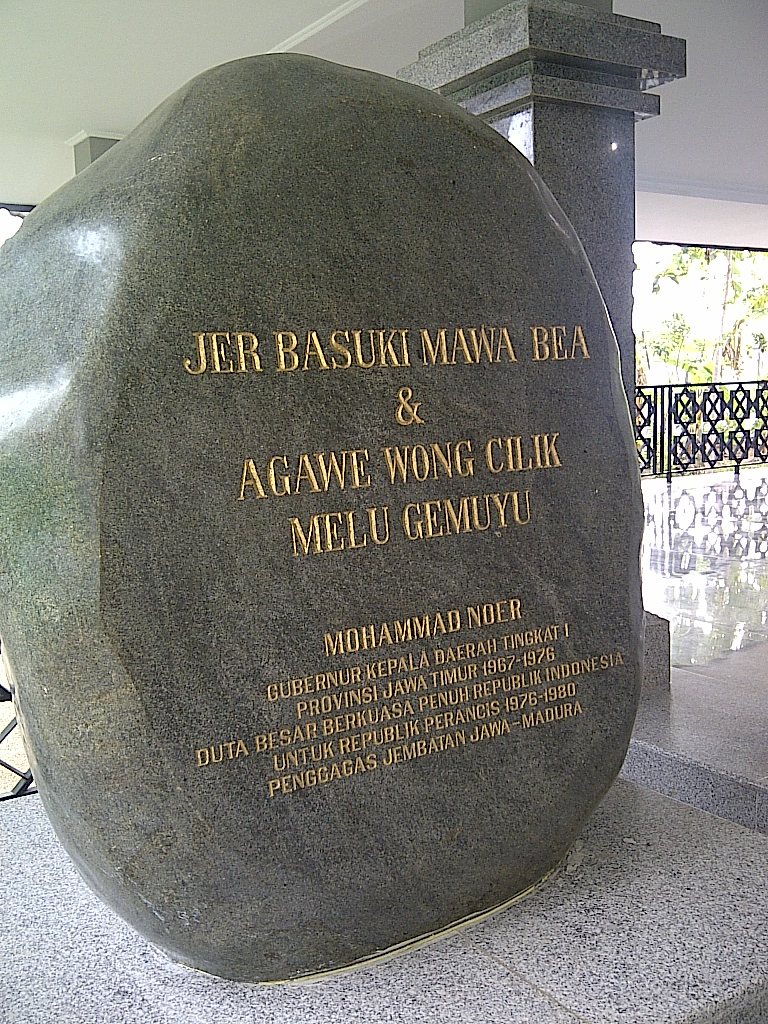 Batu Prasasti di Makam Mohammad Noer, Sampang, Madura